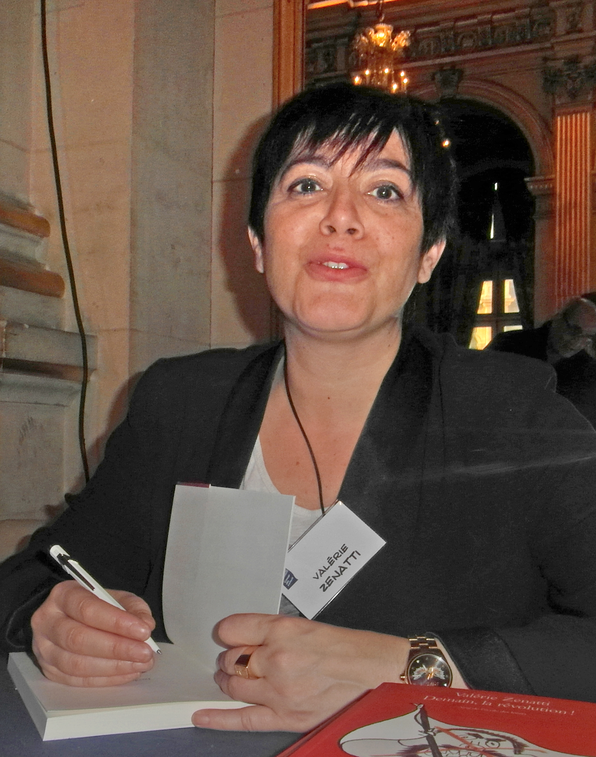 Maghreb des Livres, 7 et 8 février 2015